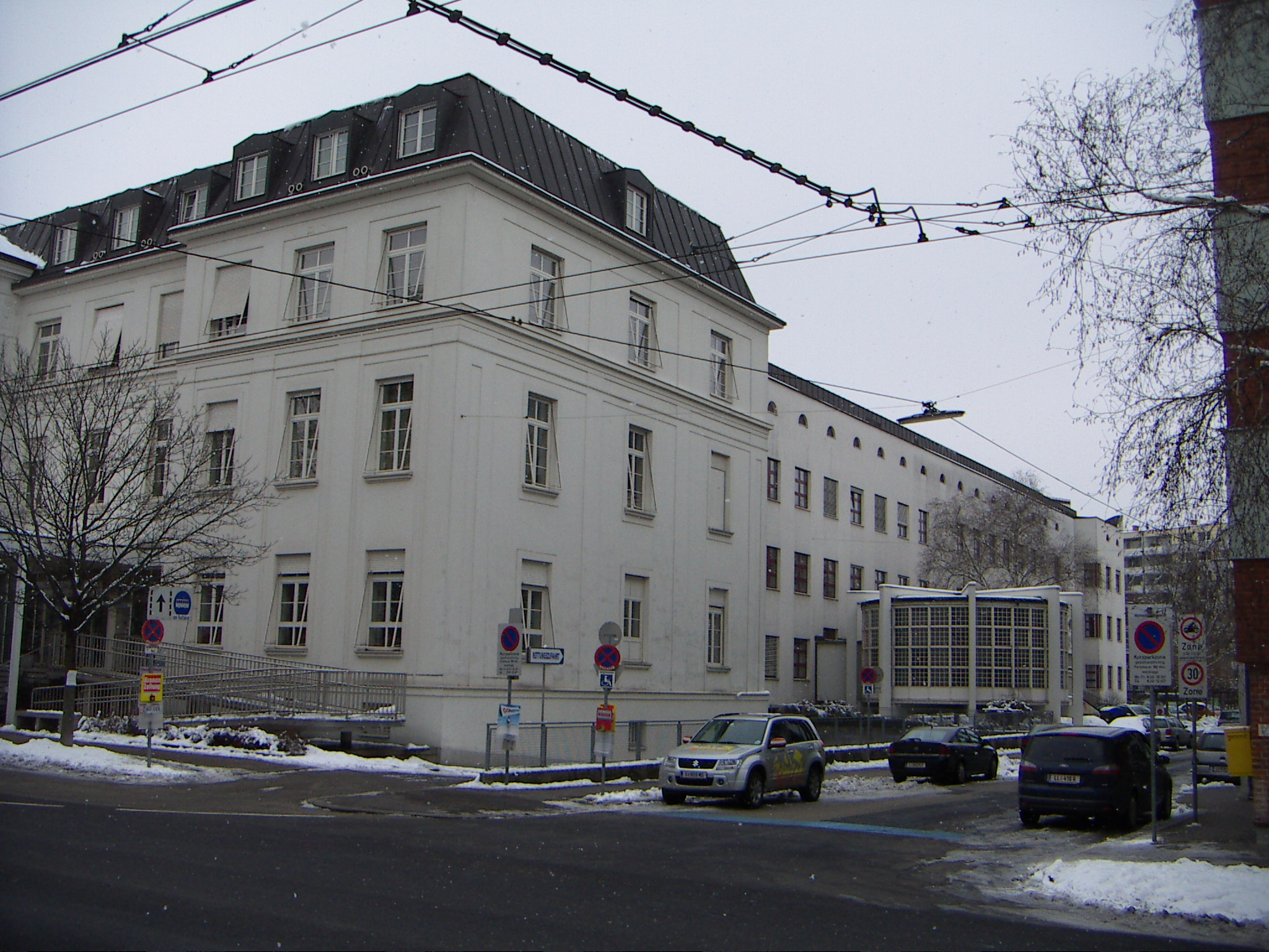 Diakonissenkrankenhaus Linz mit Kapelle von Architekt Roland Ertl